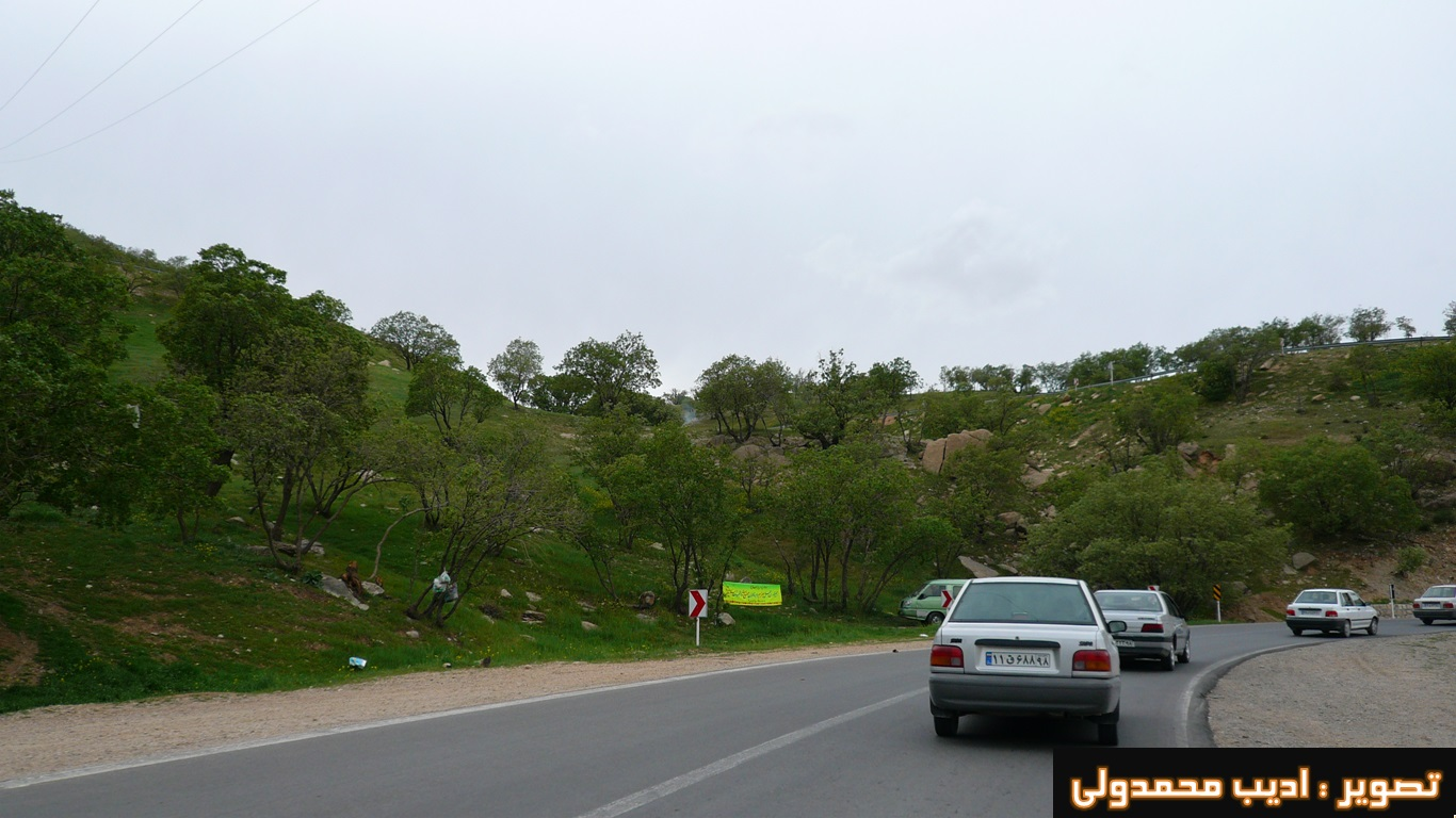 جاده دسترسی به شهرستان آبدانان در ایام عید نوروز